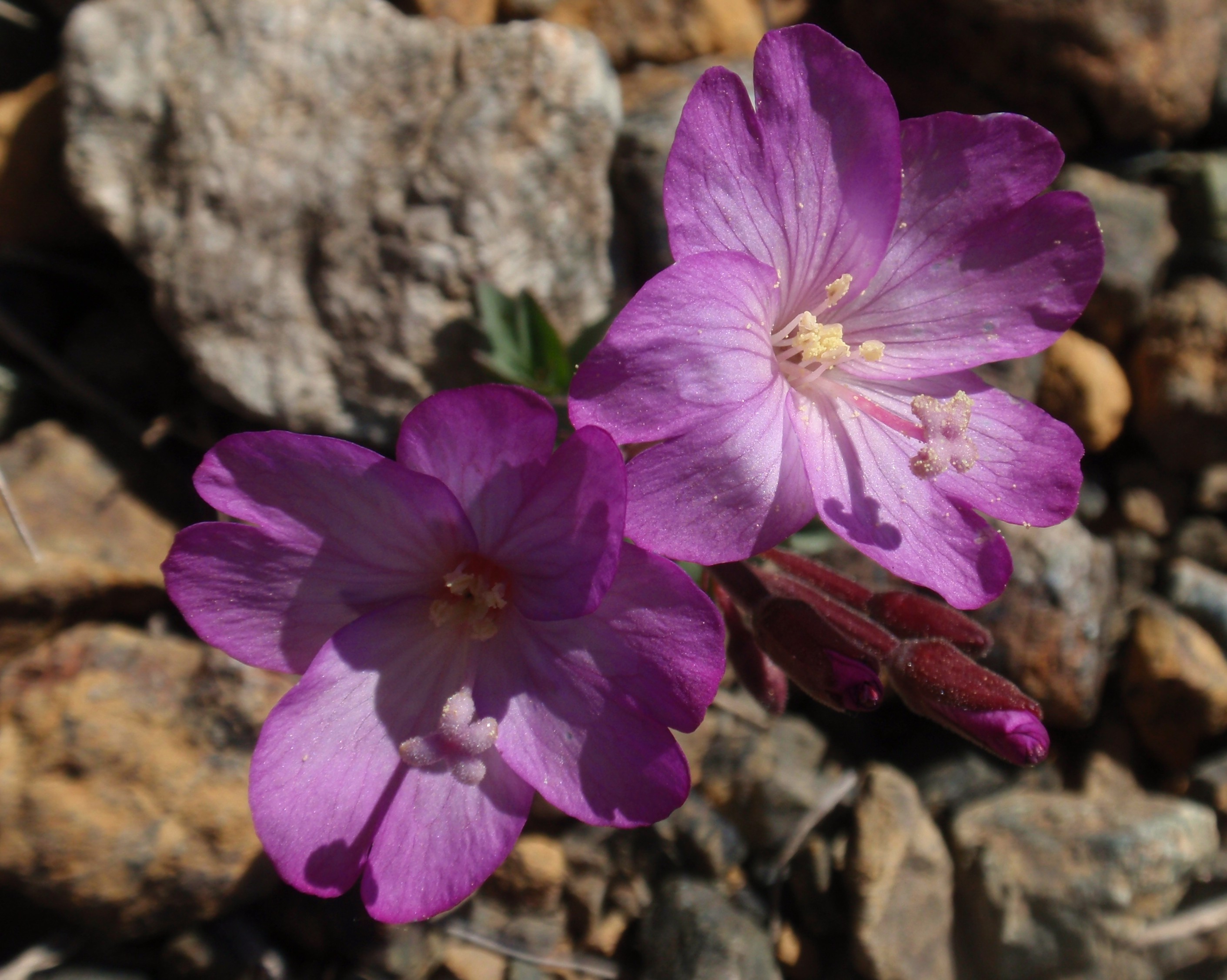 Siskiyou Fireweed (Epilobium siskiyouense)